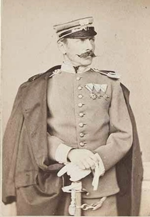 Maximilian von Parseval (1823-1902), bayerischer Adeliger und Generalmajor, um 1865